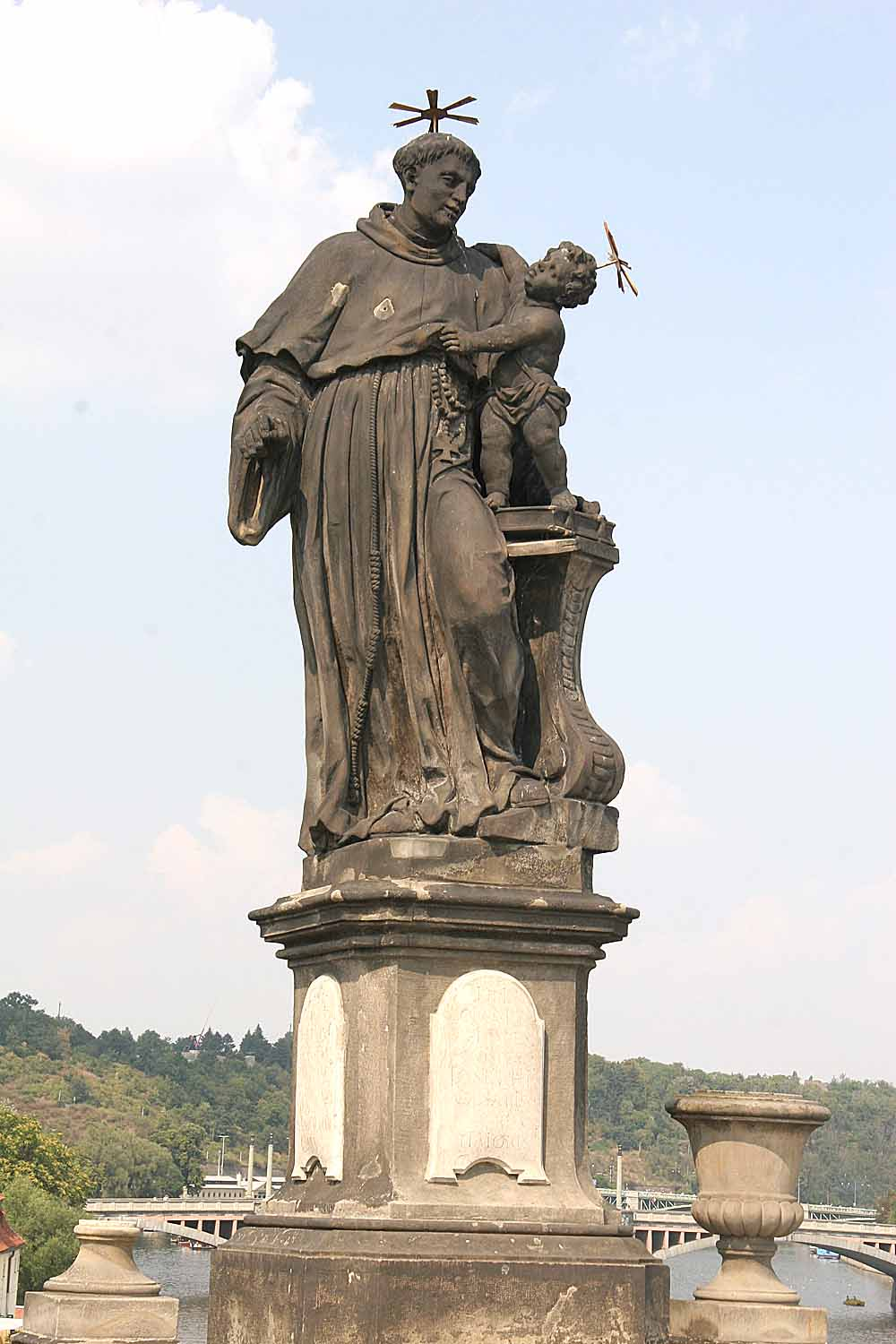 Sousoší Svatéého Antonína Paduánského na Karlově mostě